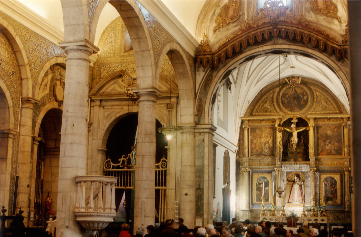 Interior da Igreja de Nossa Sra. Da Conceição, em Vila Viçosa, Portugal.